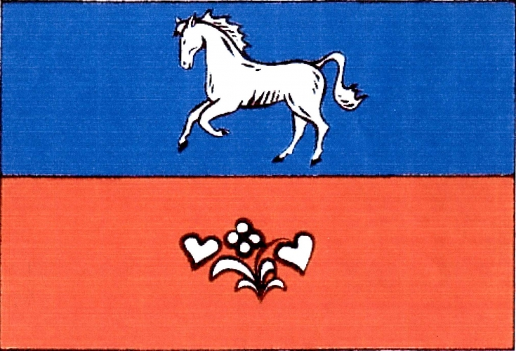 vlajka, Kuklík, okres Žďár nad Sázavou